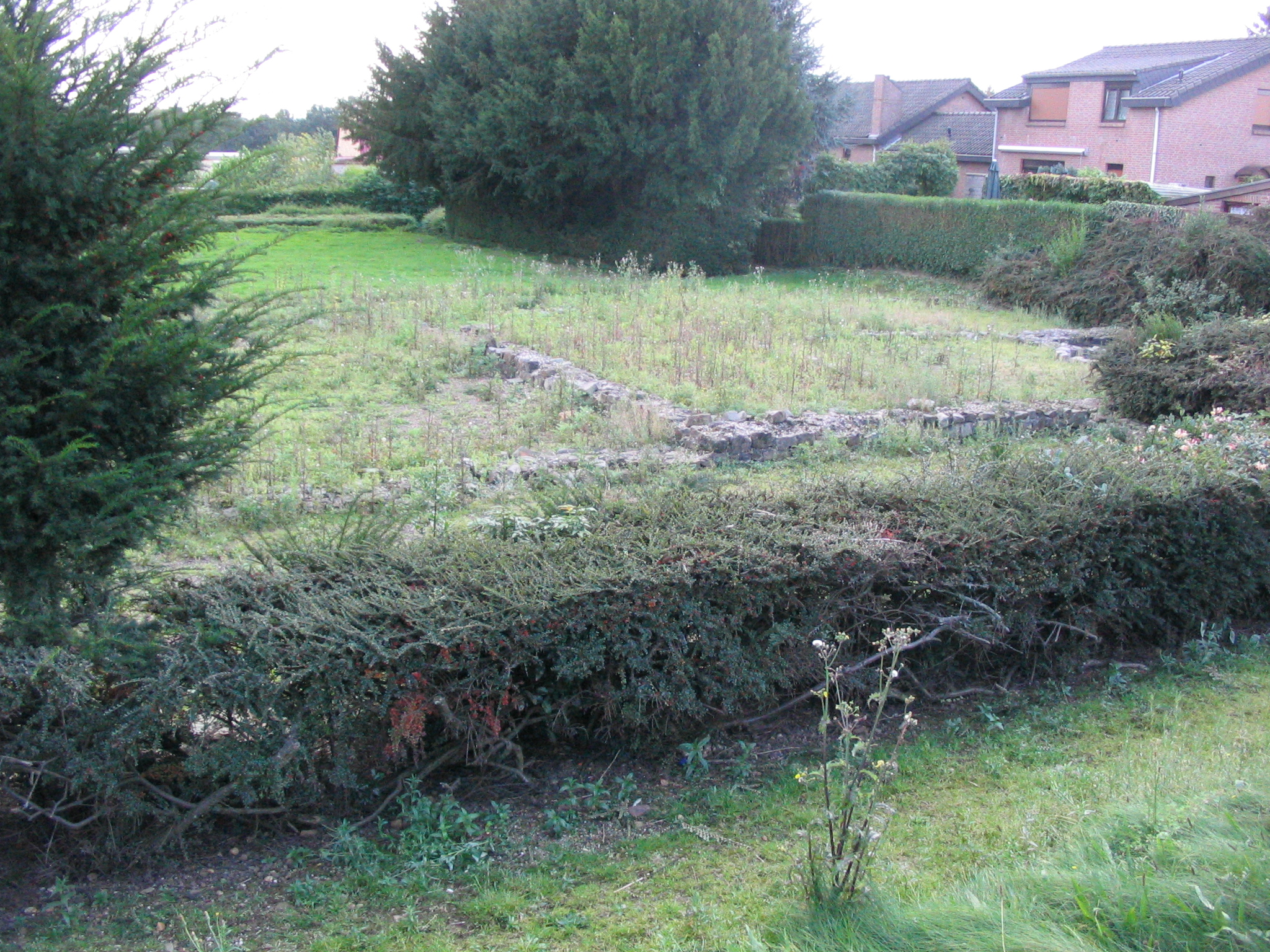 Die einzig öffentlich zugänglich gemachte Ruine einer römerzeitlichen Villa rustica aus dem 1.-3. Jh. n. Chr.